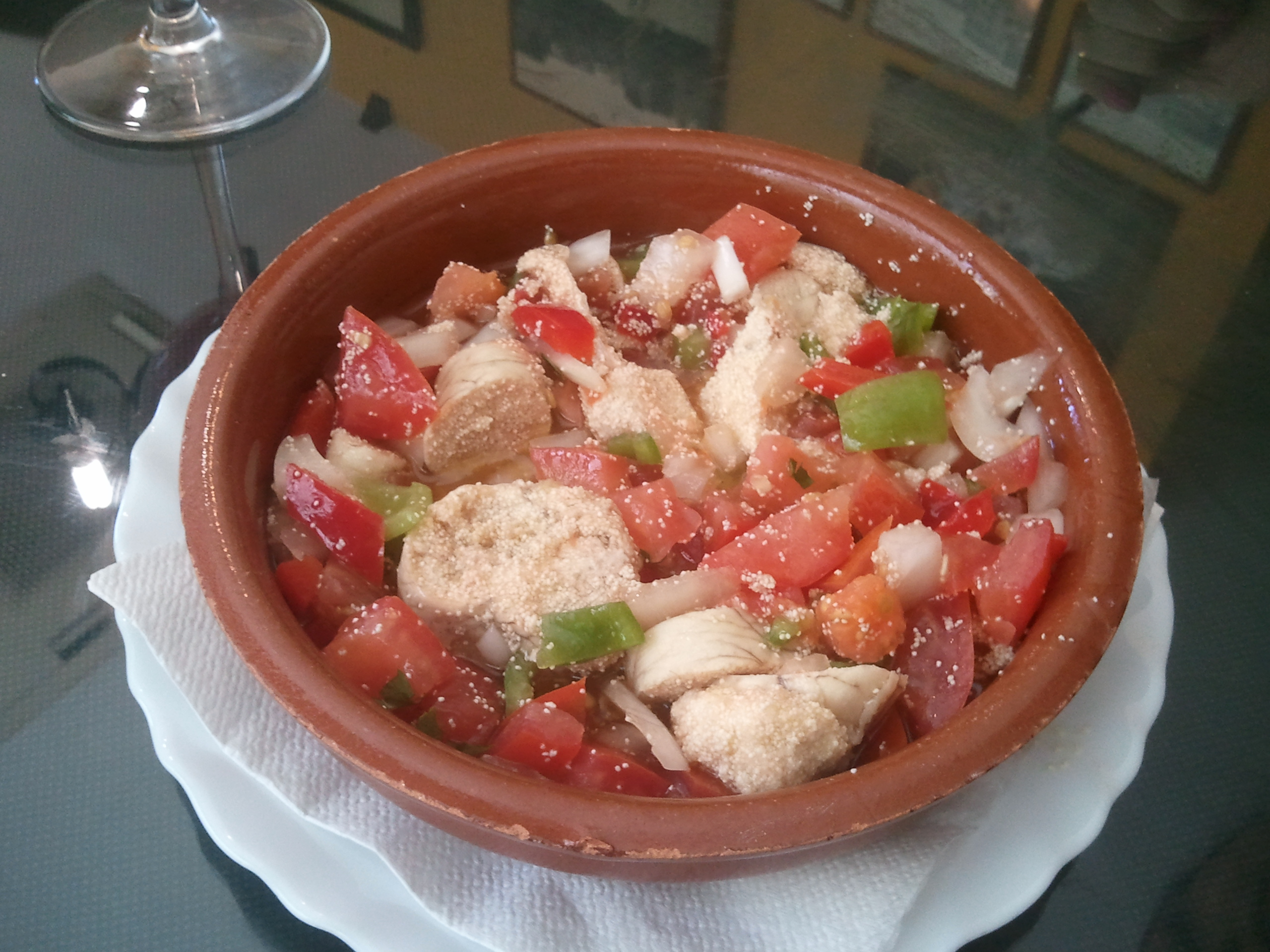 Huevas aliñás, provincia de Cádiz, España.